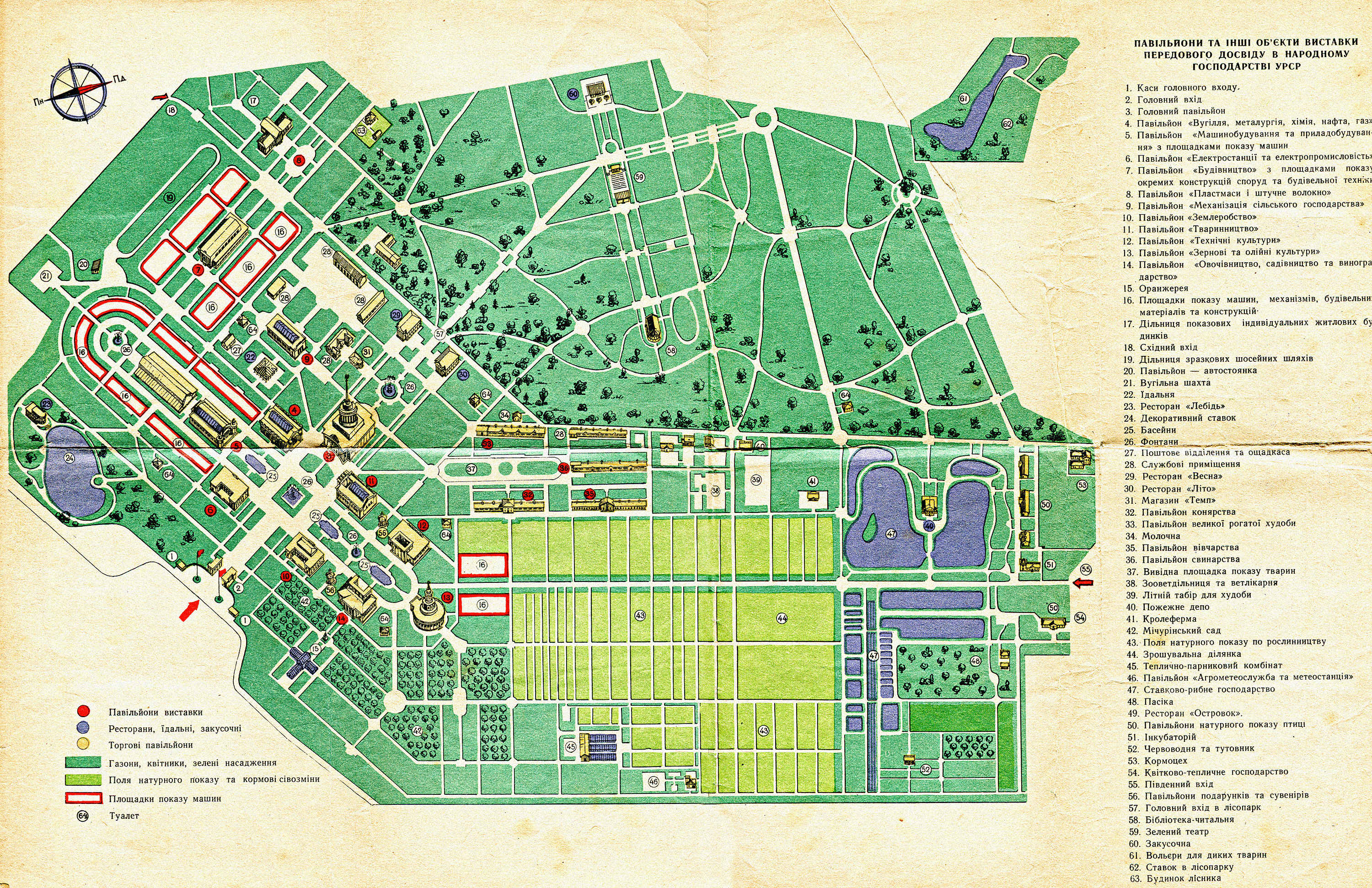 План-схема, карта ВДНХ 1958 года